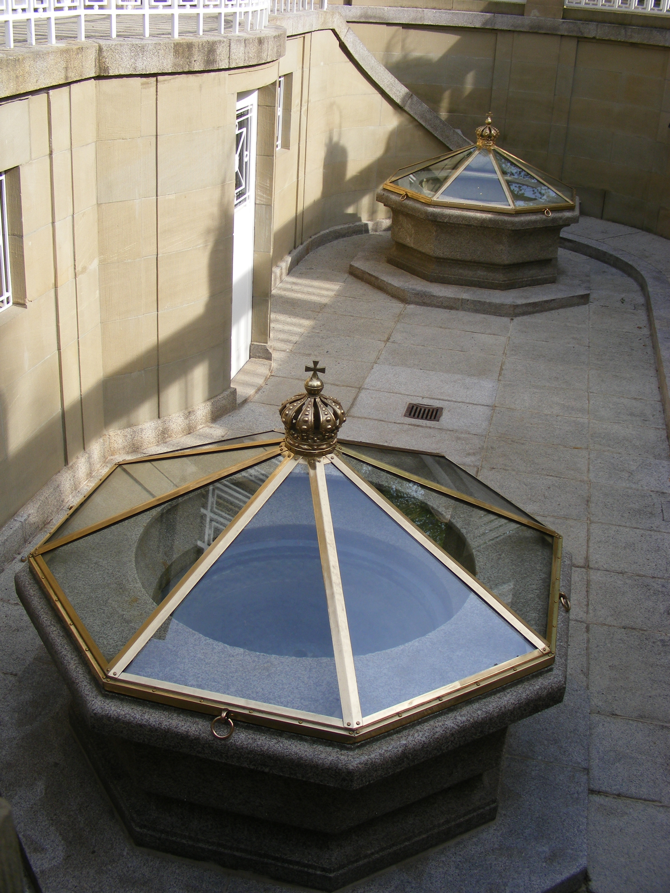 Würzburg - Maxbrunnen, untere Brunnen (Frühjahr/Sommer/Herbst).